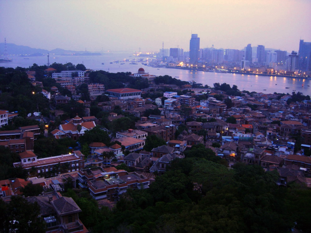 xiamen,gulangyu